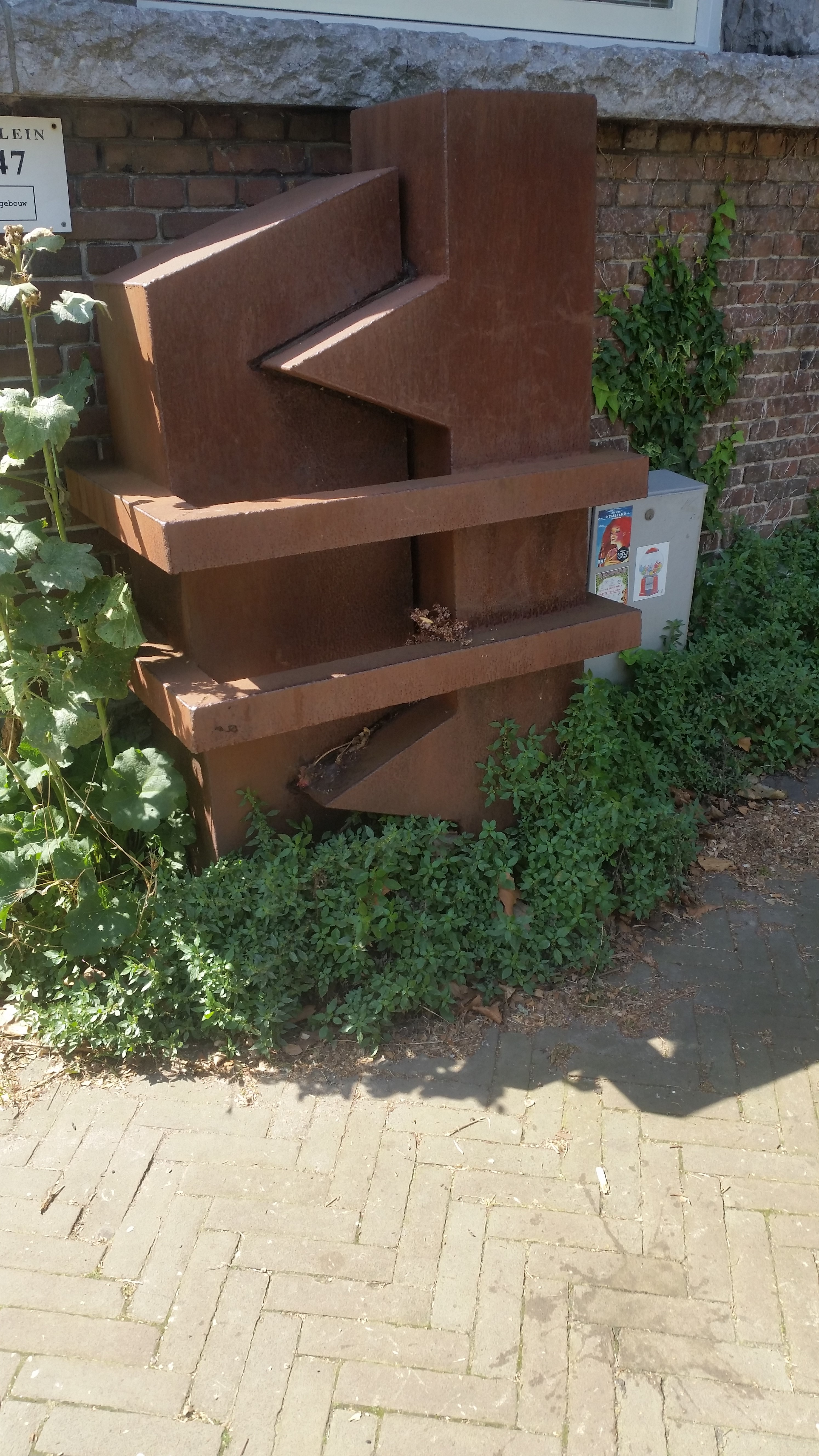 Beeld (datum onbekend; maker onbekend) naast Azartplein 1-47, Amsterdam